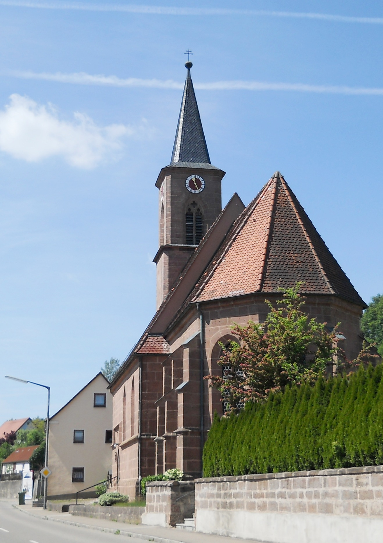 Obererlbach (Ortsteil von Haundorf im Landkreis Weißenburg-Gunzenhausen), Kath. Pfarrkirche St. Valentin